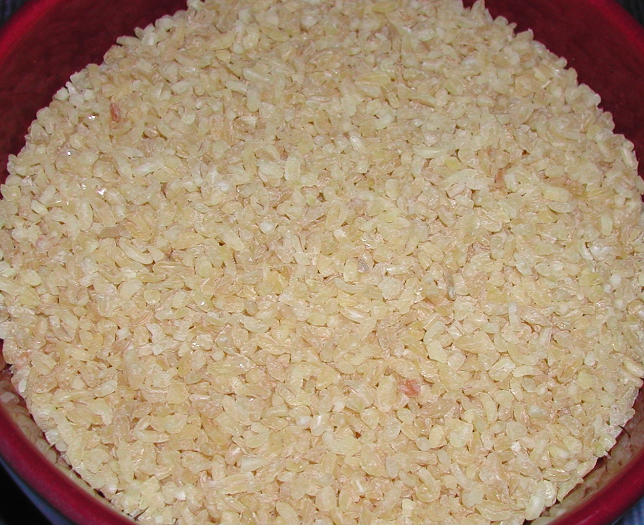 Rice